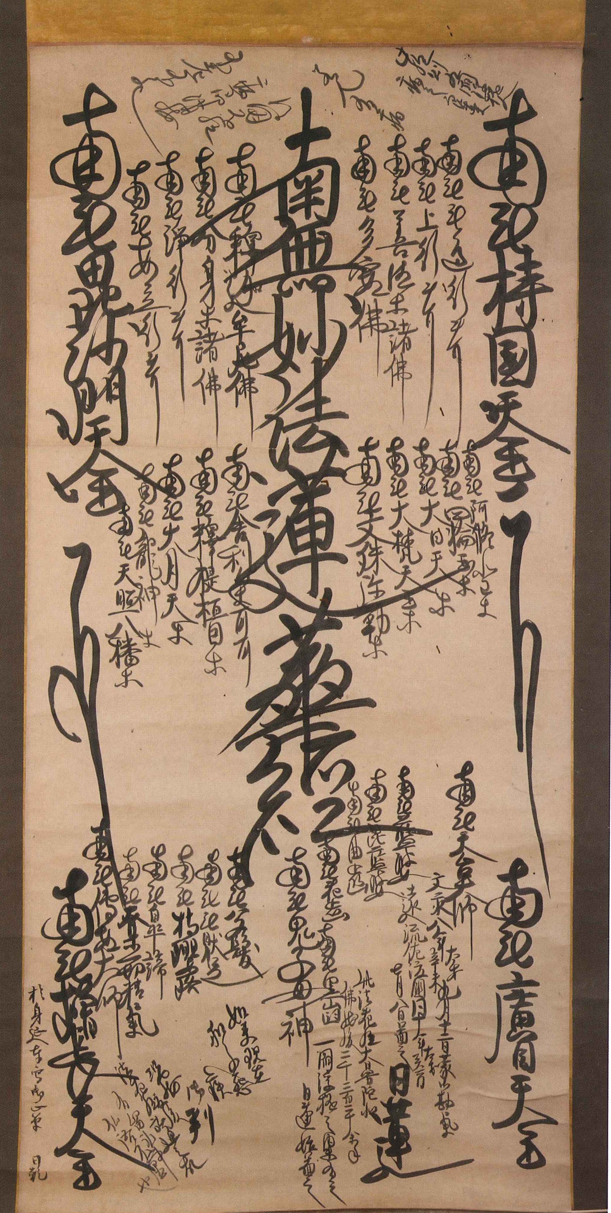 佐渡始顕の本尊